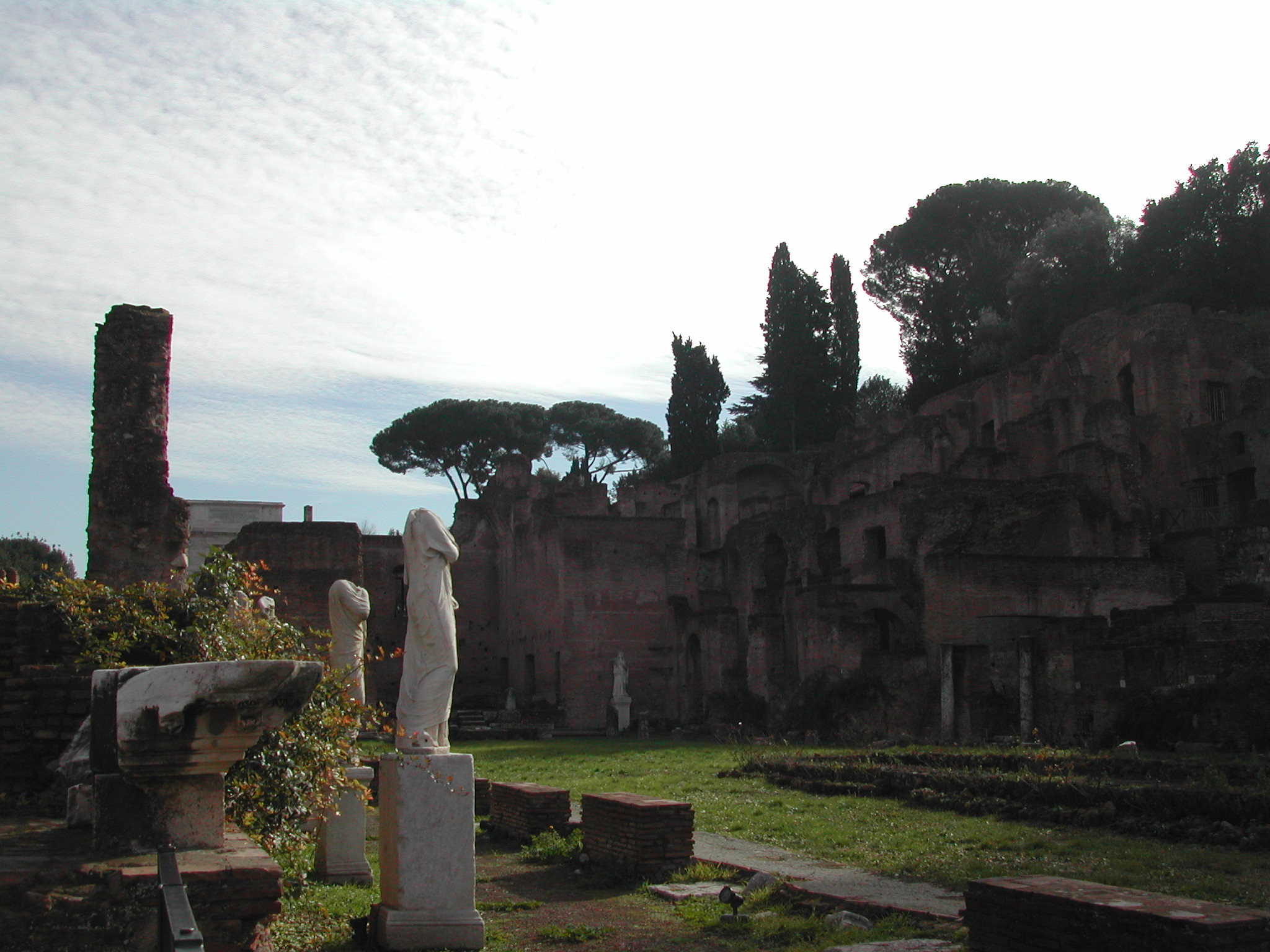 Maison des Vestales sur le Forum Roman et la colline du Palatin à Rome (Latium, Italie).